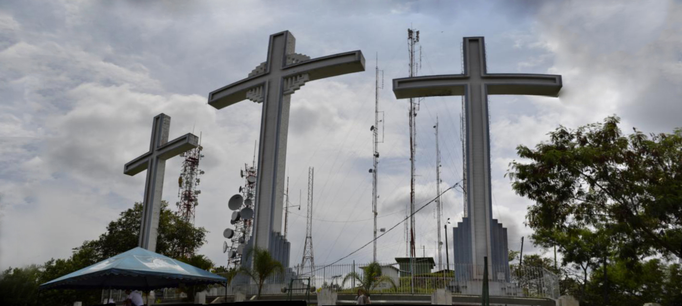 Monumento de las tres cruces